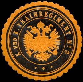 Sealing stamp Title: K. und K. Trainregiment No. 3 Description: Eisenbahn, orange, schwarz, geprägt Place: size: 4 cm